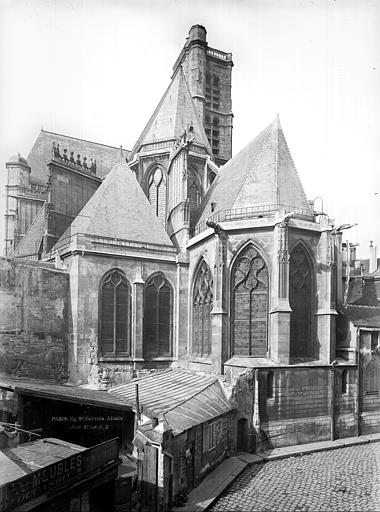 Ensemble est